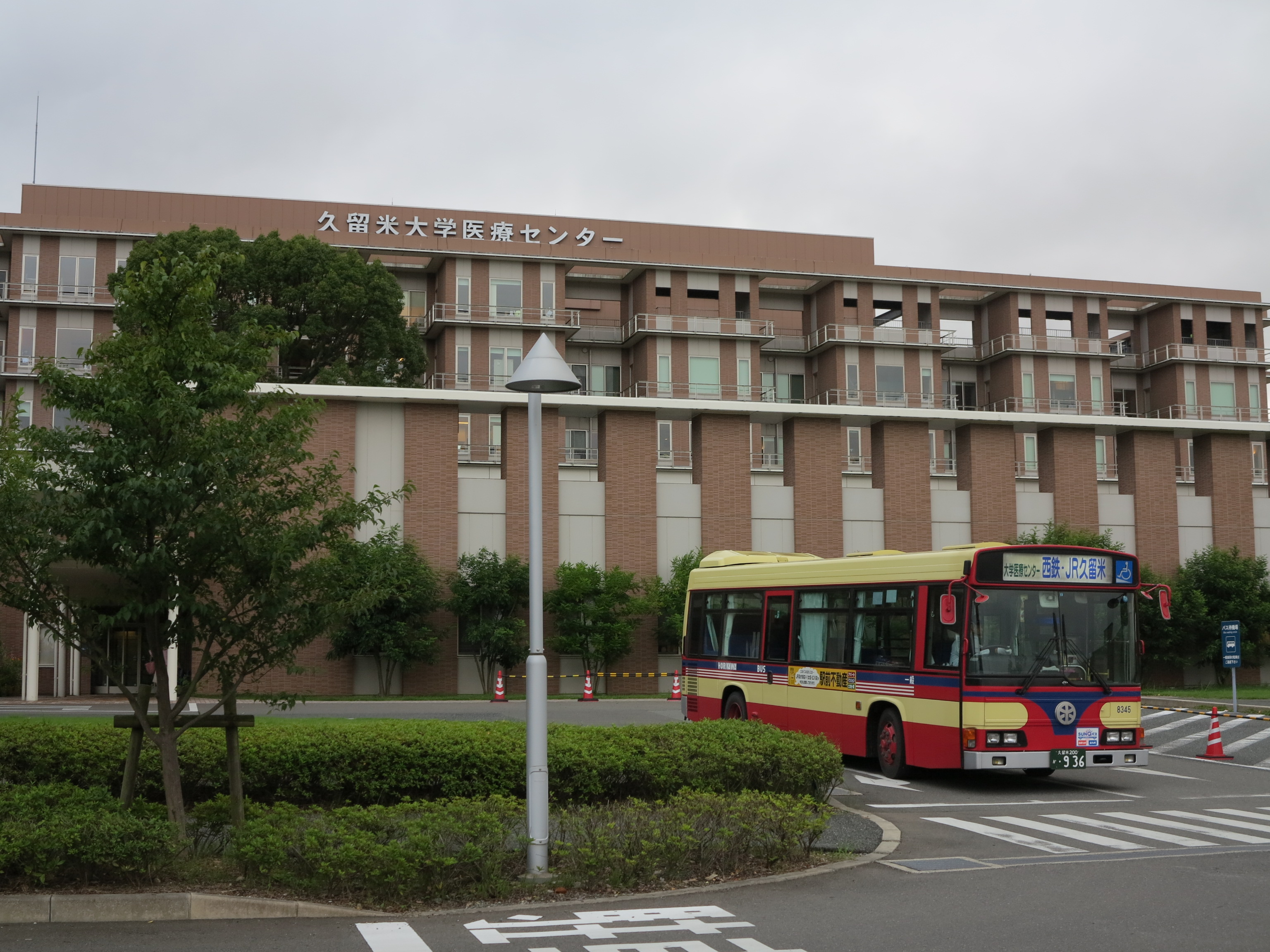 久留米大学医療センターを出発する堀川バス